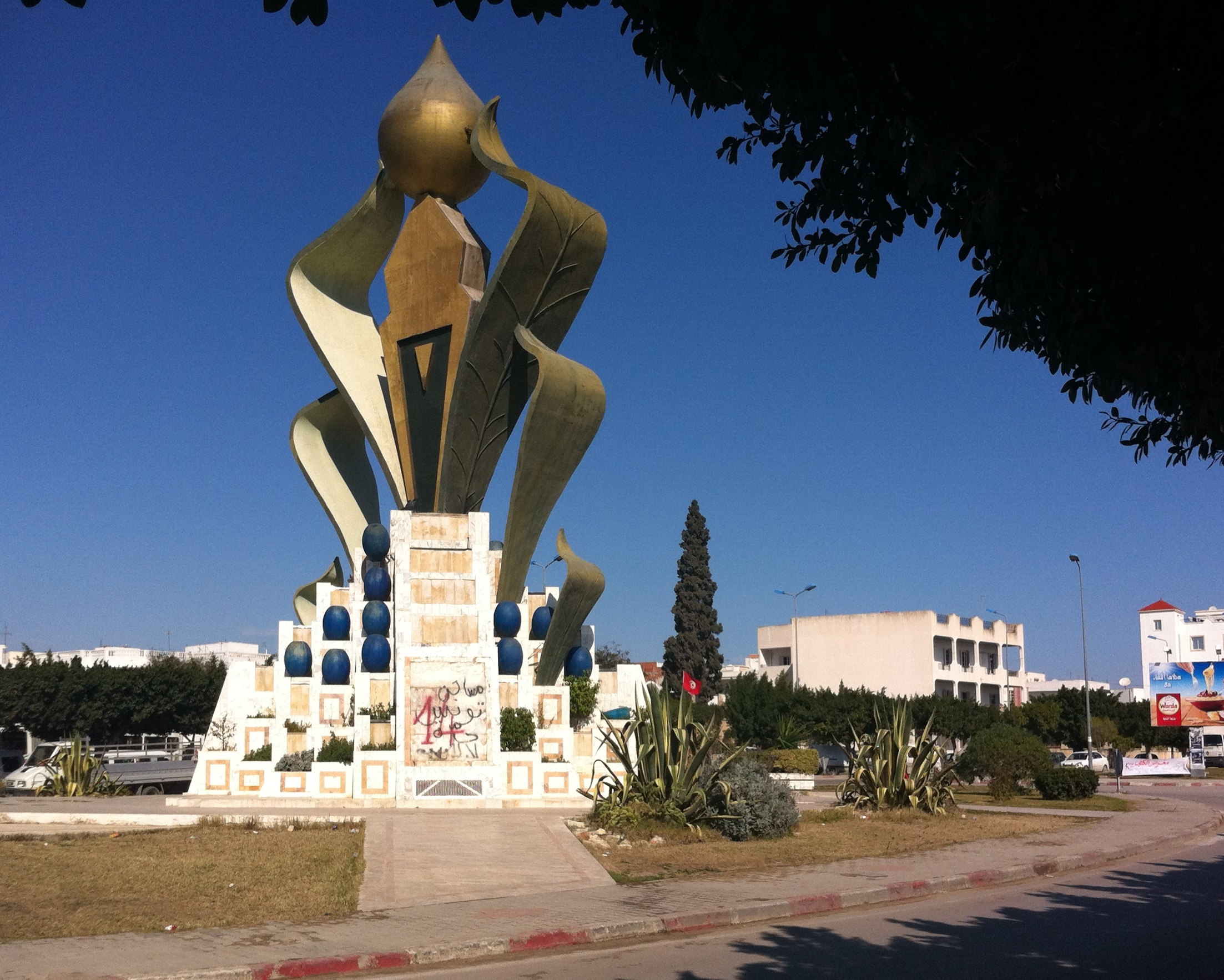 Monument au centre ville de M'saken, des tags de la révolution tunisienne sont présents sur le socle de la sculpture.